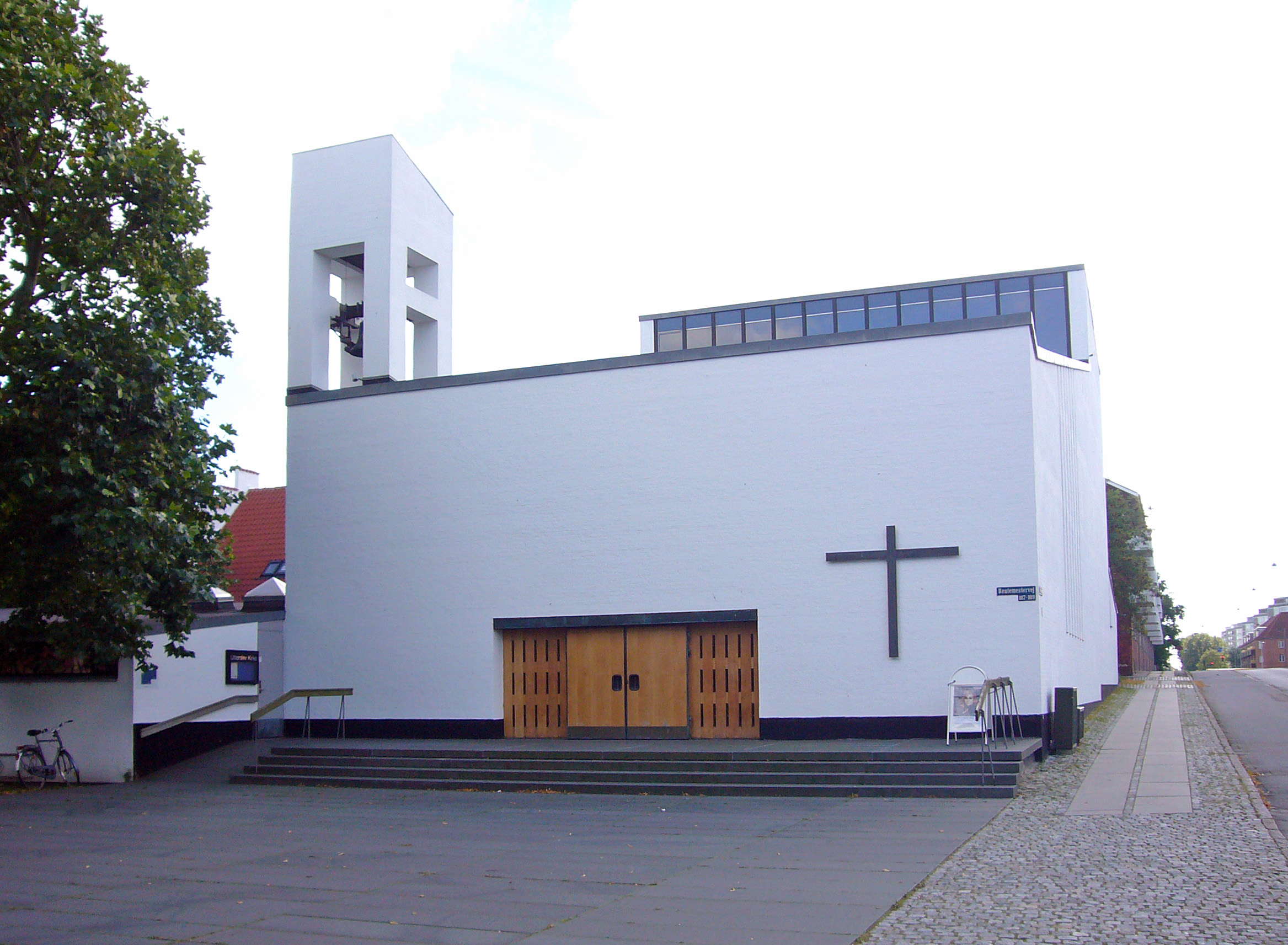 Utterslev Kirke, Copenhagen, Denmark. Utterslev Kirke